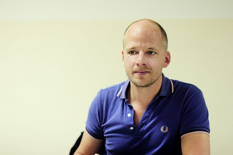 Per Leo, 11.September 2014, Mahn- und Gedenkstätte Steinwache, Dortmund, Lesung aus "Flut und Boden"